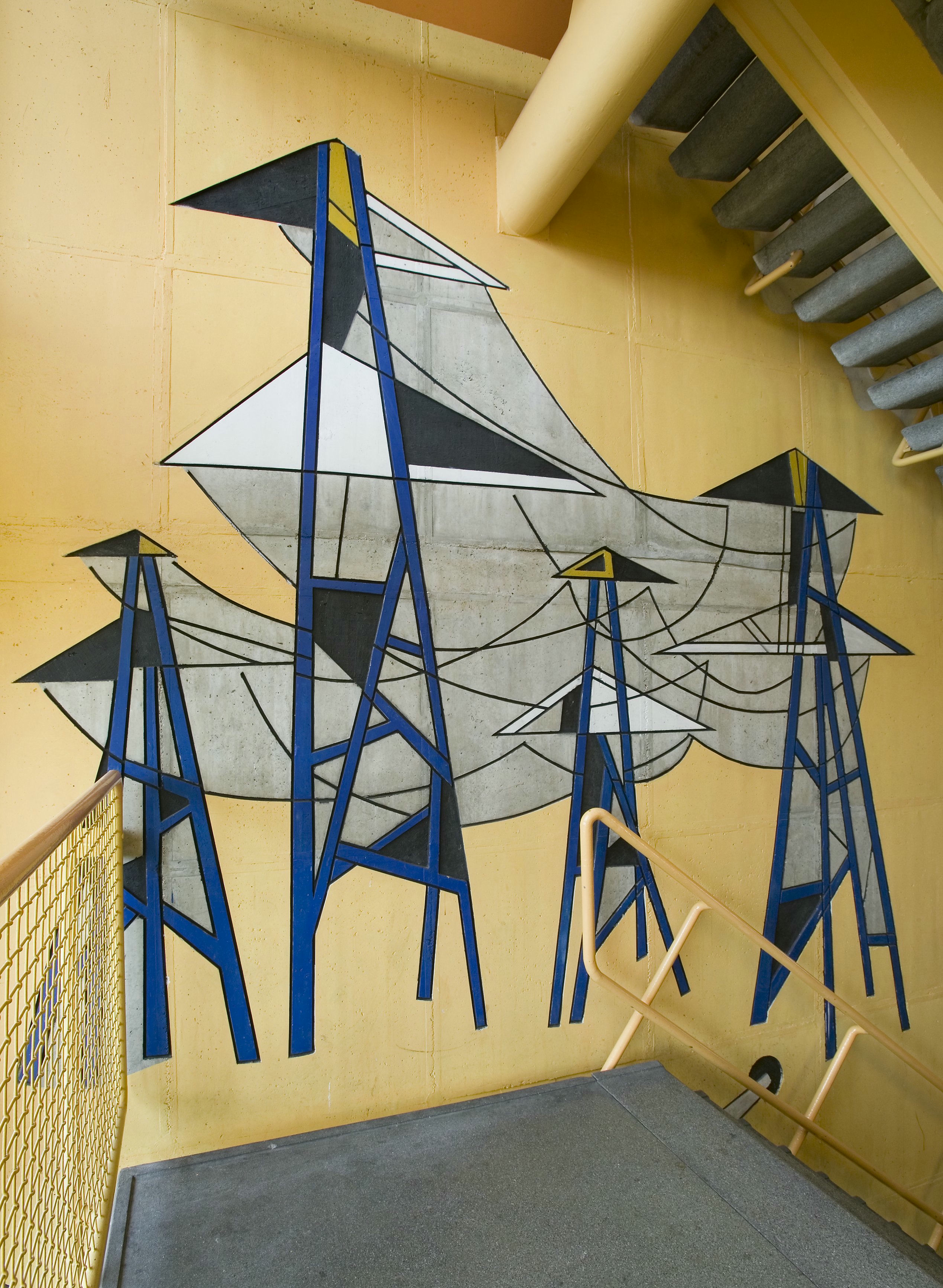 Christelijke technische school, Patrimonium: Interieur, betonreliëf in trappenhuis (opmerking: Gefotografeerd voor Monumenten van Herrezen Nederland)